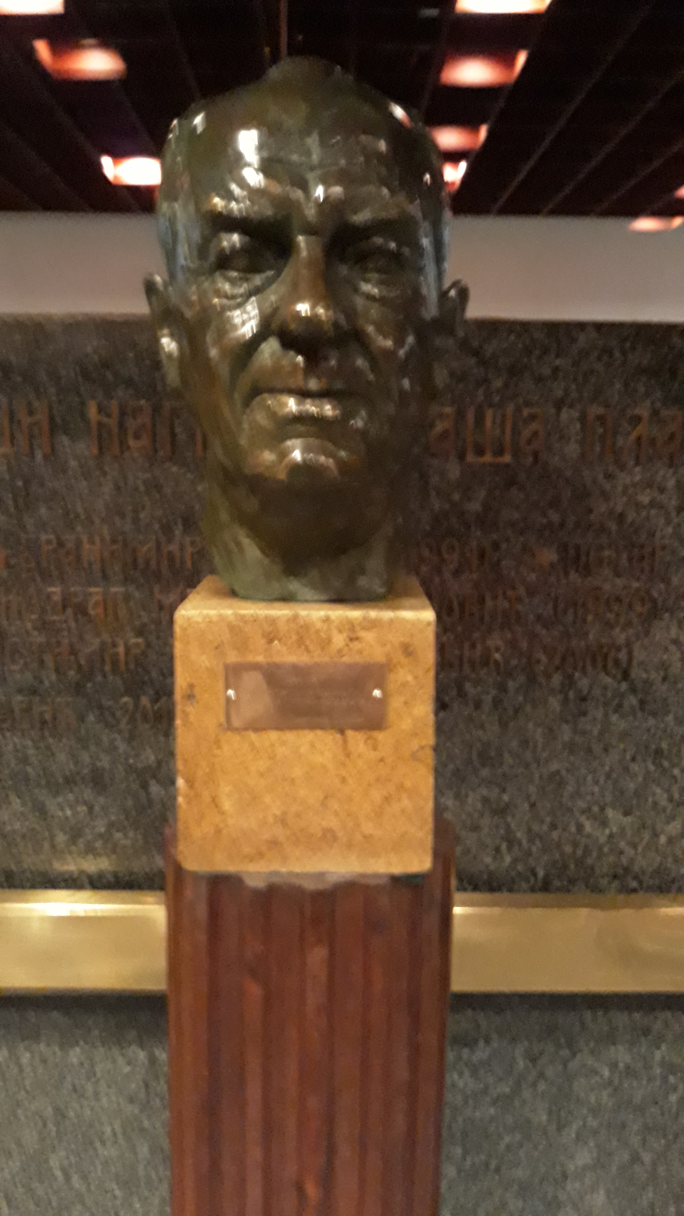 Биста Раши Плаовићу у фоајеу Народног позоришта у Београду